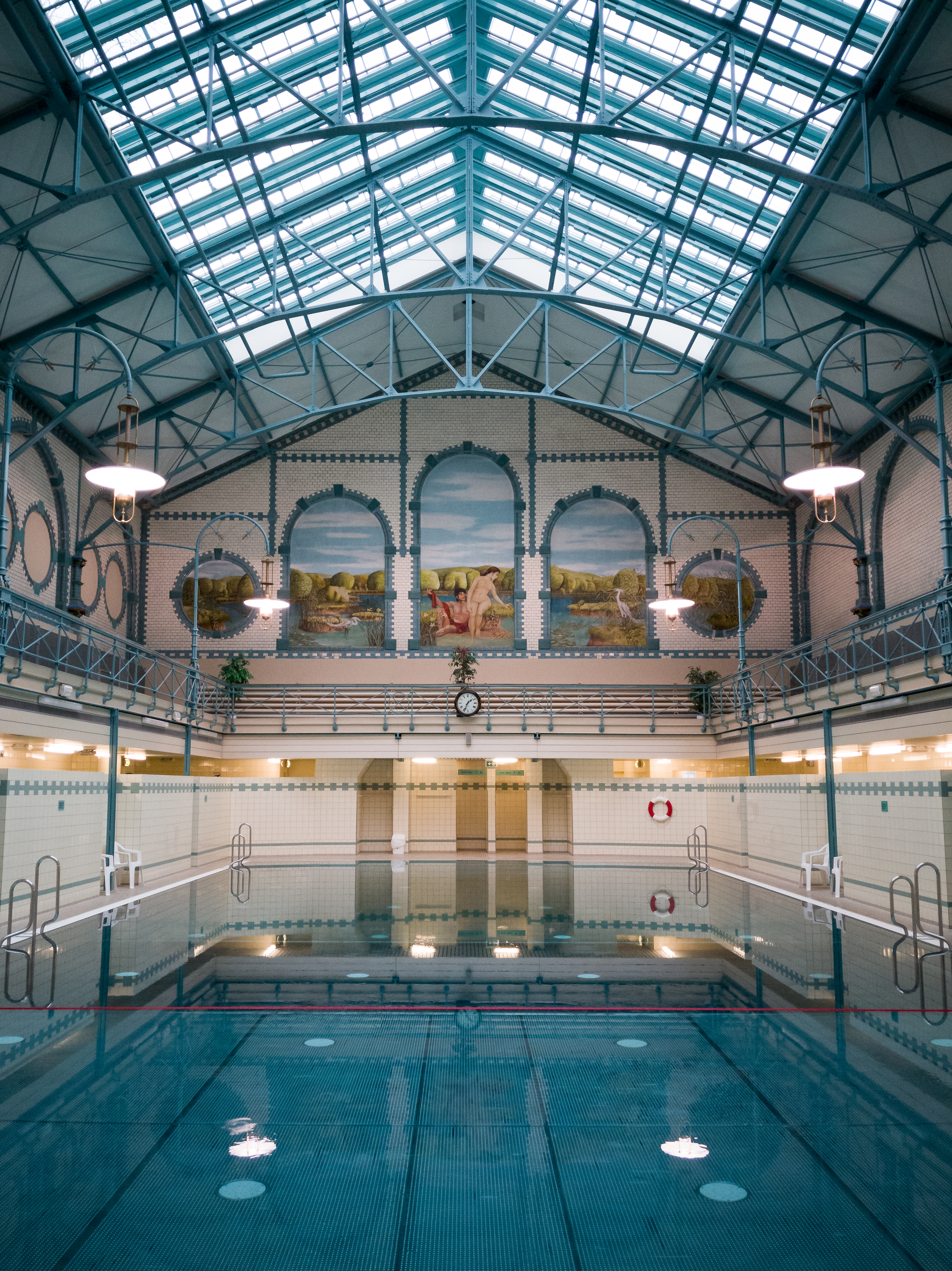 Städtische Volksbadeanstalt, Obj.-Dok.-Nr. 09096277, Krumme Straße 10, Charlottenburg-Wilmersdorf, Berlin